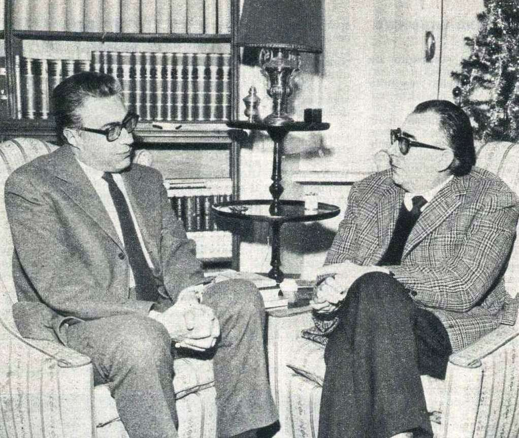 Gli scrittori Diego Fabbri e Luigi Silori nella casa di quest'ultimo a Roma (1964)